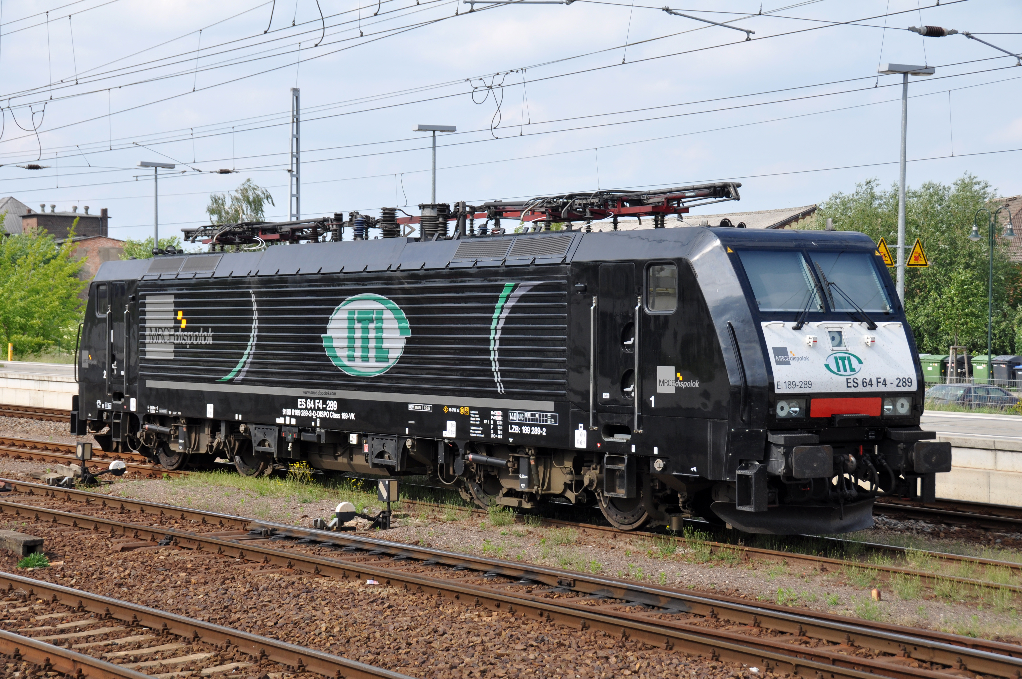 Bahnhof Angermünde